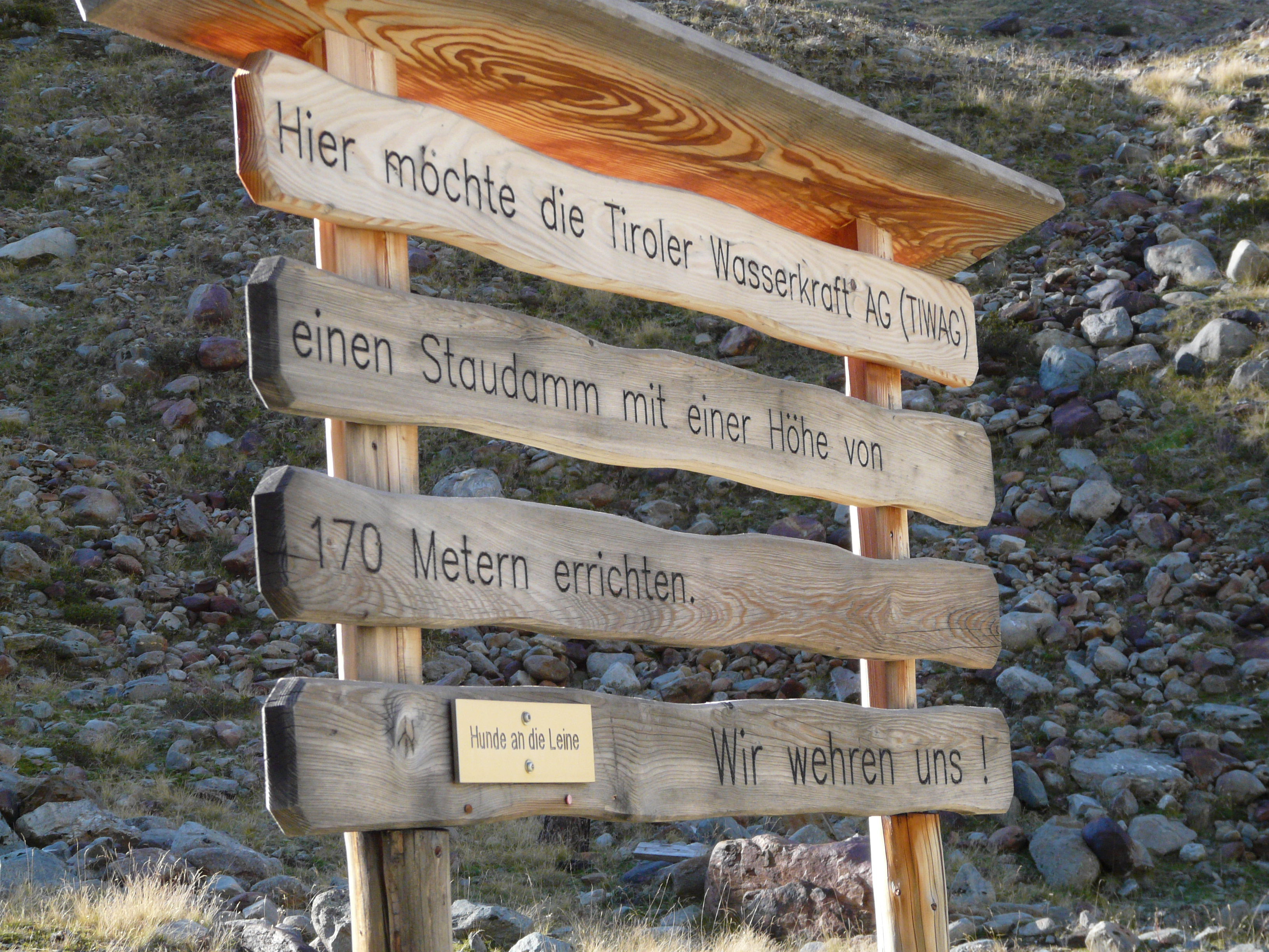 Protestschild gegen einen von der TIWAG geplanten Staudamm im Rofental (an der Position des ehemaligen Rofener Eissees).